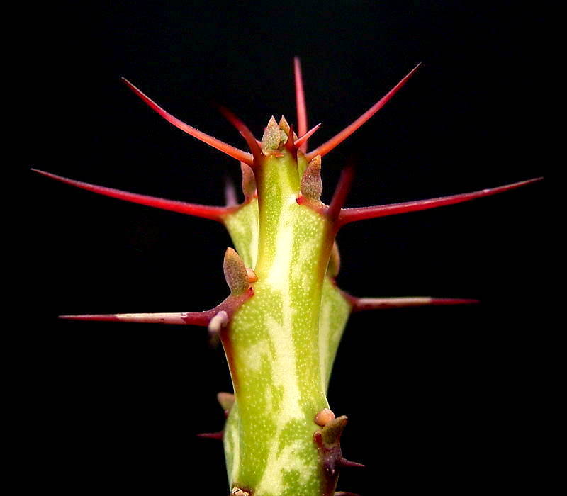 Euphorbia gemmea